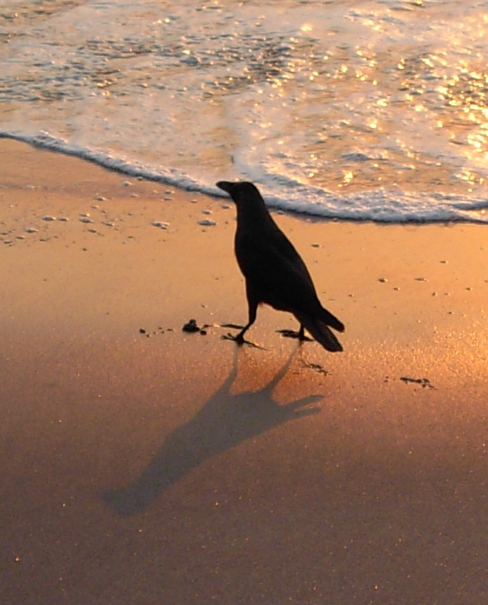 അസ്തമയ സൂര്യപ്രകാശത്തില്‍ കടല്‍ത്തീരത്തെ കാക്കയുടെ നിഴല്‍. തൃക്കുന്നപ്പുഴ കടപ്പുറത്തെ ദൃശ്യം.